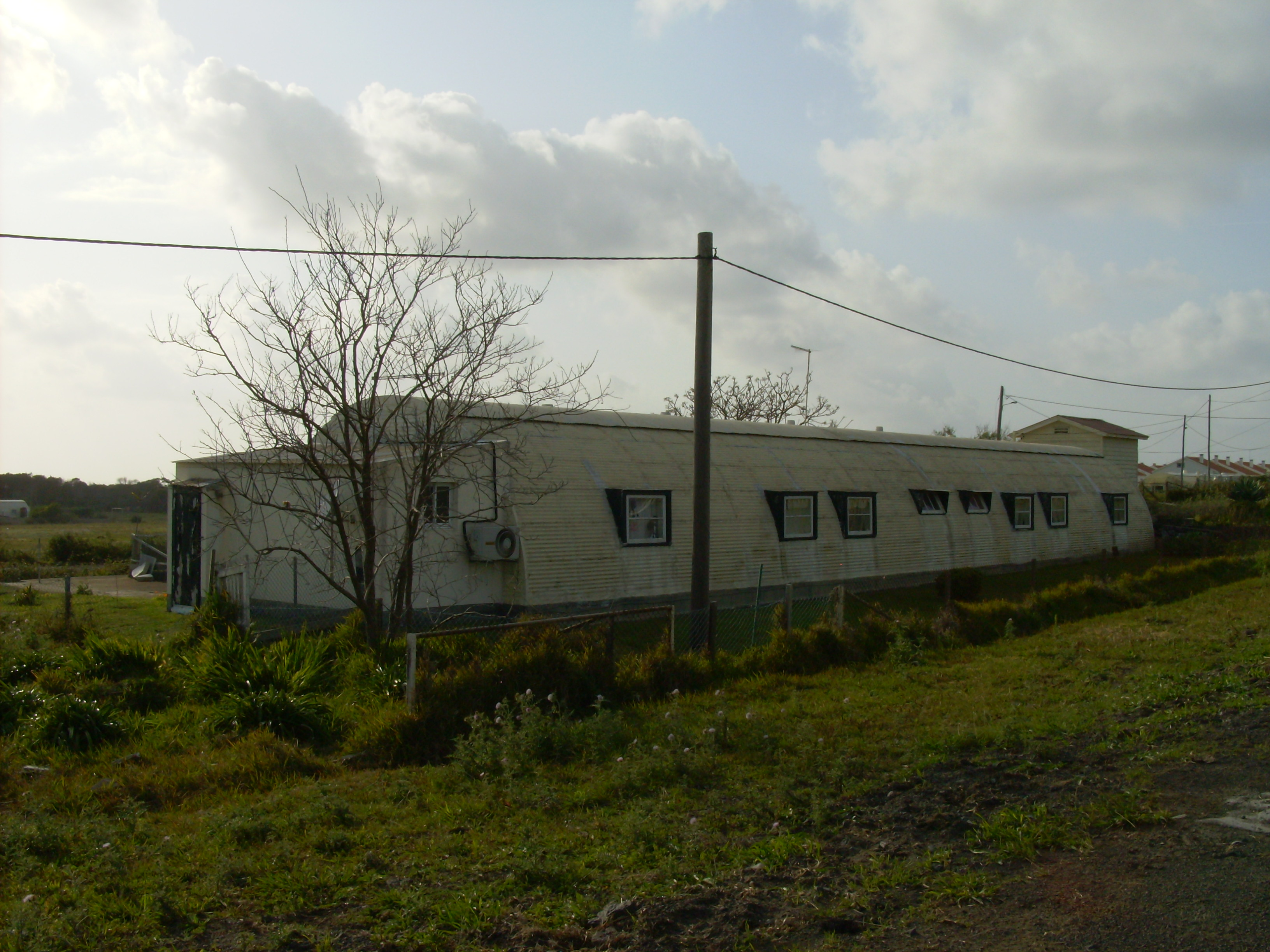 Quonset hut na Ilha de Santa Maria (Açores), Portugal.